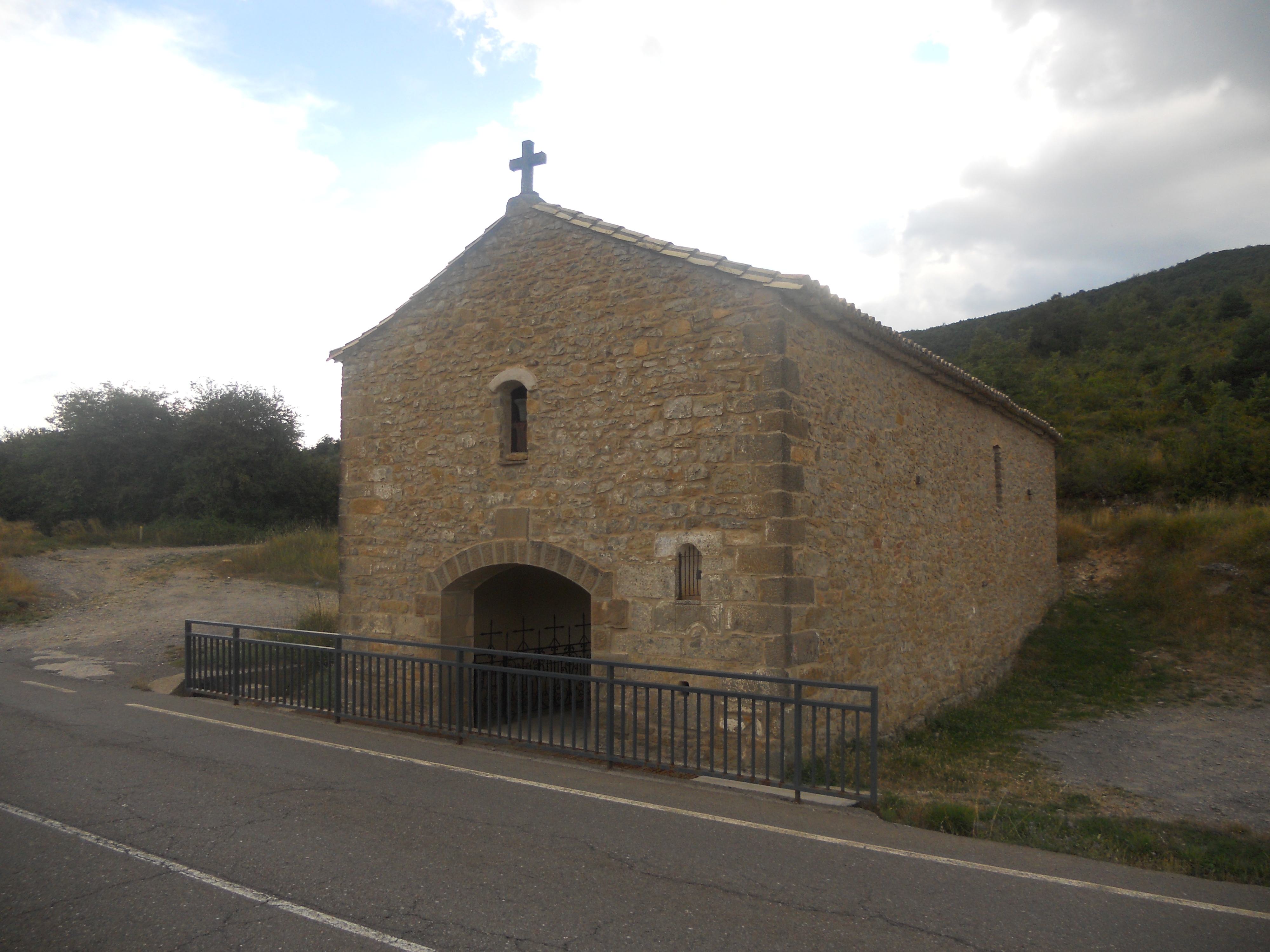 Ermita de Santa Barbara , Puerto de Santa Barbara- Huesca.